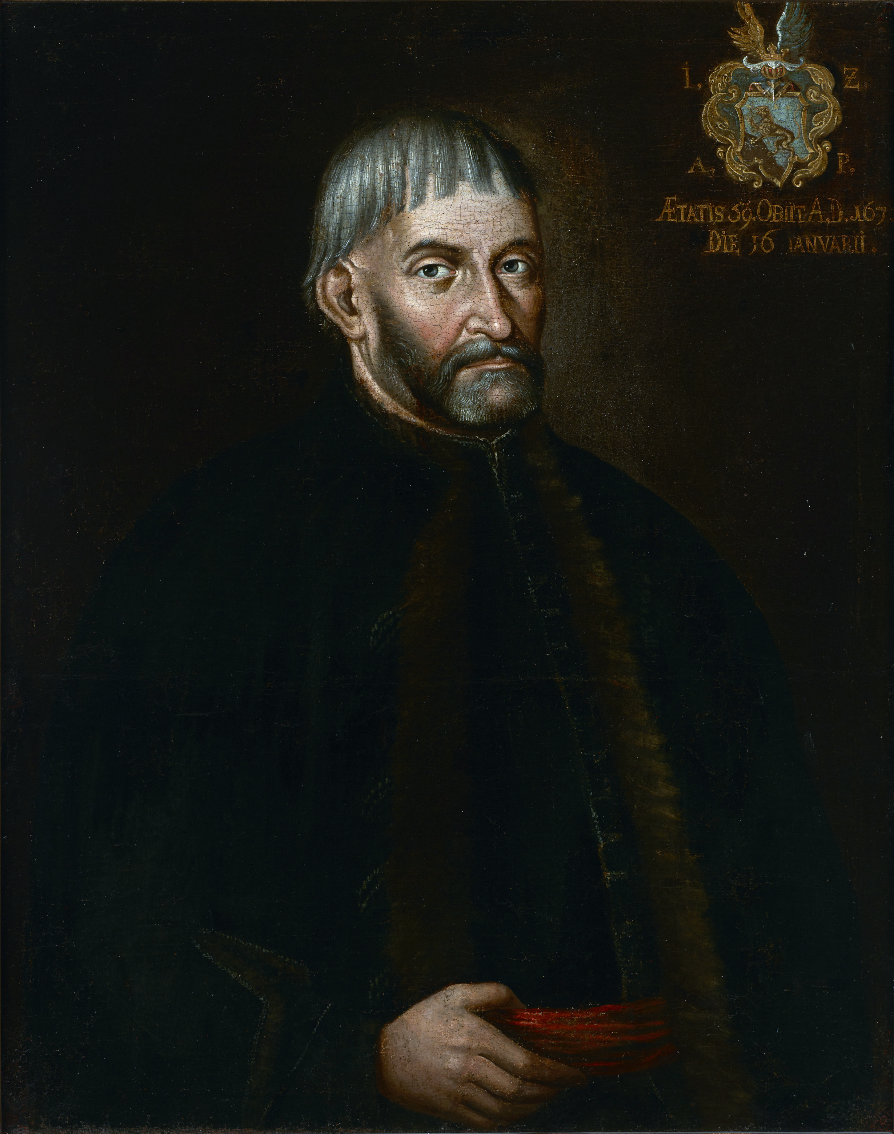 Беларуская (тарашкевіца): Партрэт невядомага з князёў Жыжэмскіх (Žyžemski)